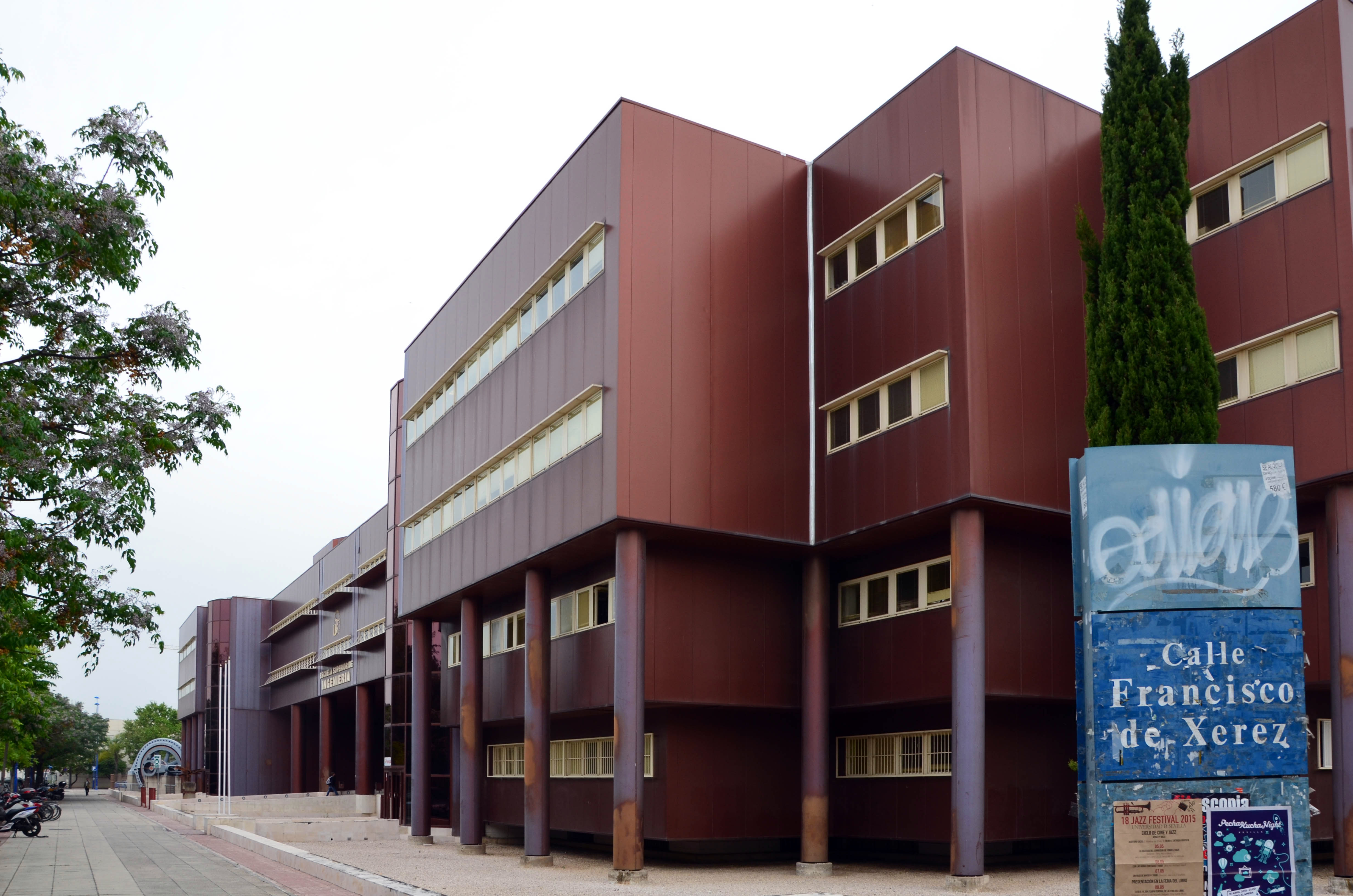 L'École Technique Supérieure d'Ingéniérie de Séville (Espagne), située dans le pavillon appelé "Place d'Amérique" de l'Exposition universelle de 1992. Ce pavillon regroupait une grande partie des pays d'Amérique latine.